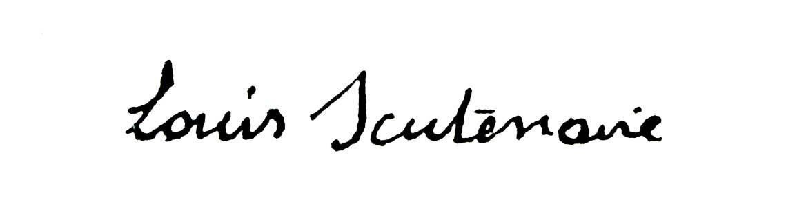 Signature de l'écrivain Louis Scutenaire, scan d'après lettre à l'User. Cette image ou le texte qui y est représenté est seulement composé de formes géométriques simples et de texte. Elle n’atteint pas le seuil d'originalité nécessaire pour la protection du droit d’auteur, et est donc du domaine public.